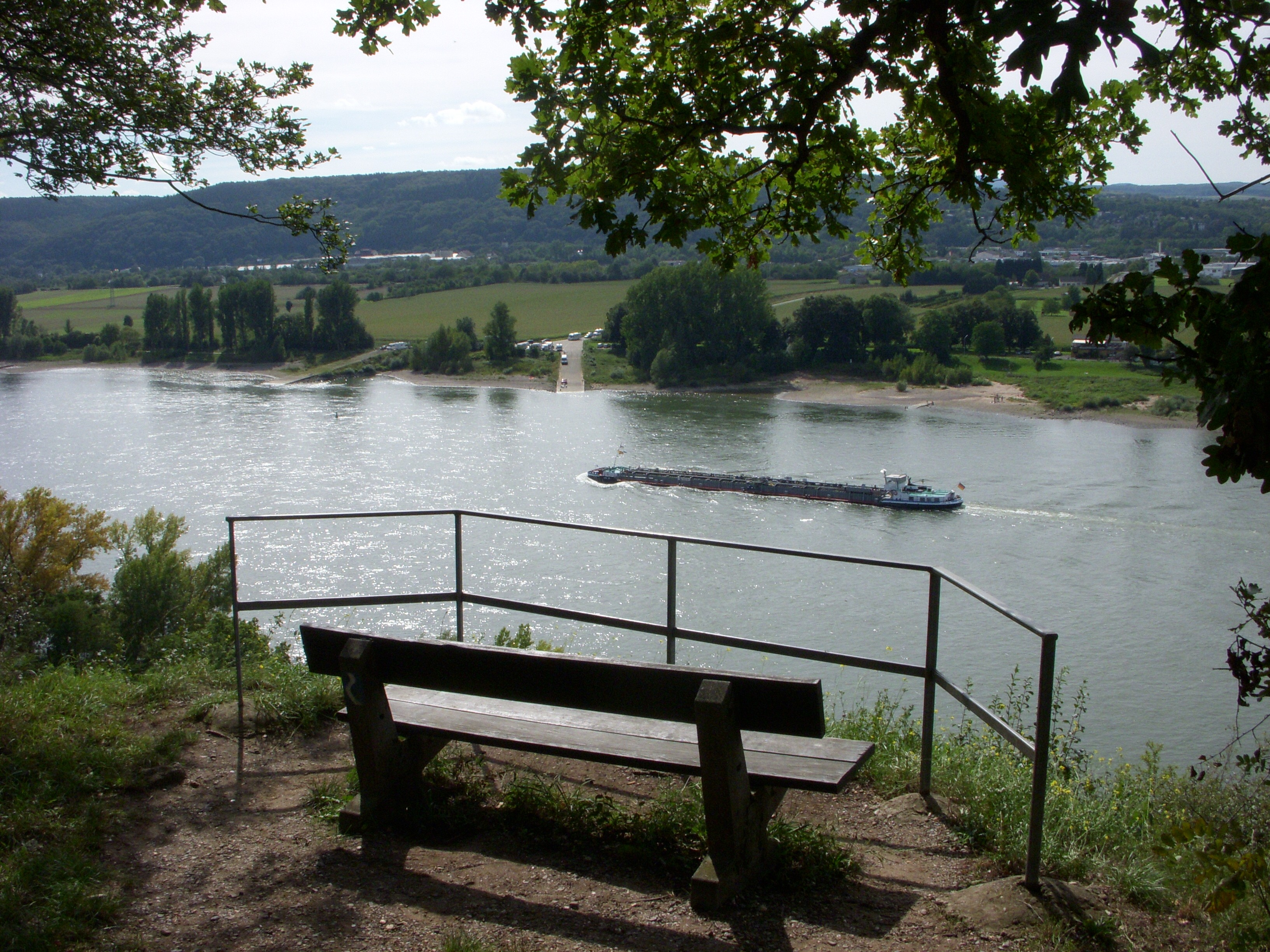 Der Rheinsteig bei Dattenberg, Rheinland-Pfalz, Deutschland